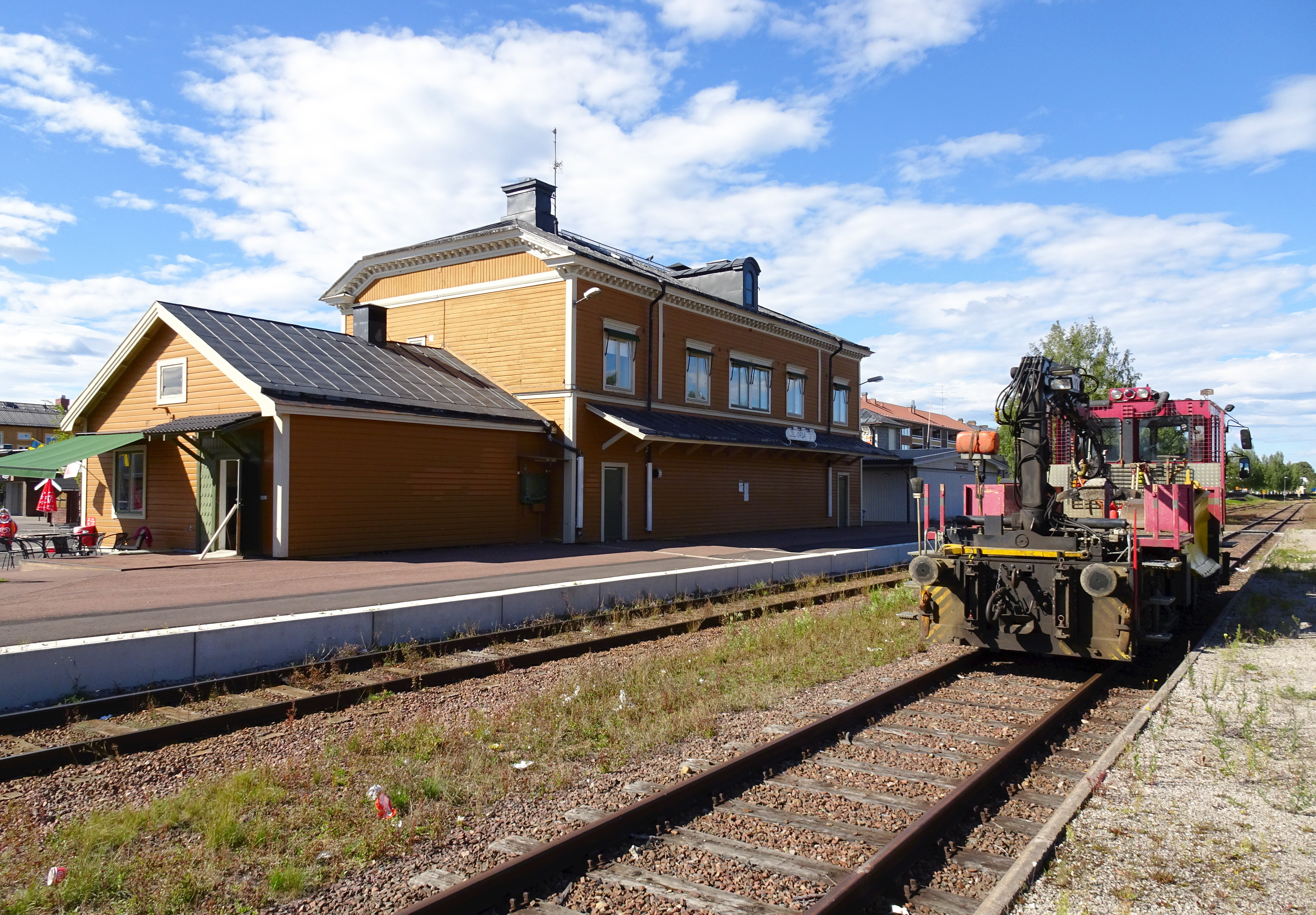 Orsa stationshus